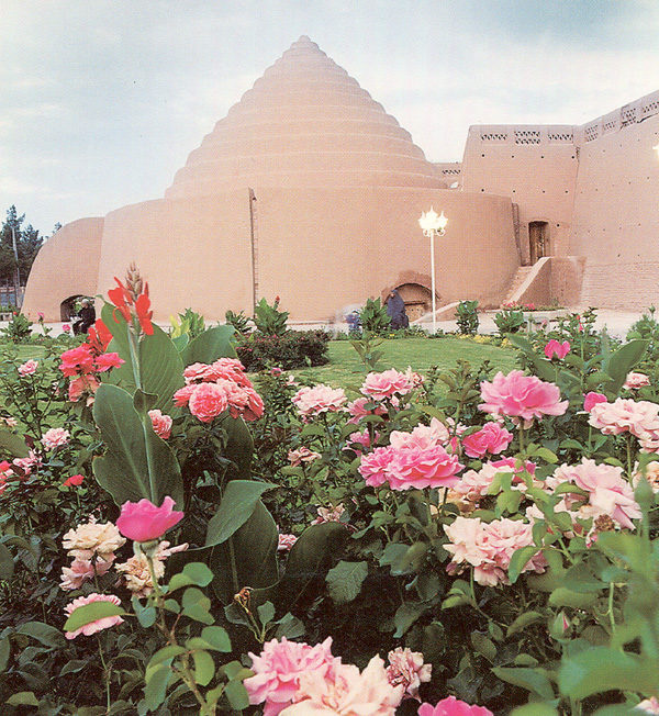 A "yakhchal", built near Kerman, Iran